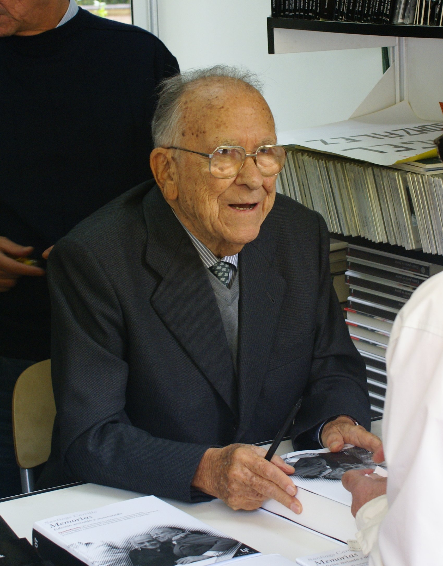 Santiago Carrillo firmando en la Feria del Libro de Madrid en 2006Santiago Carrillo